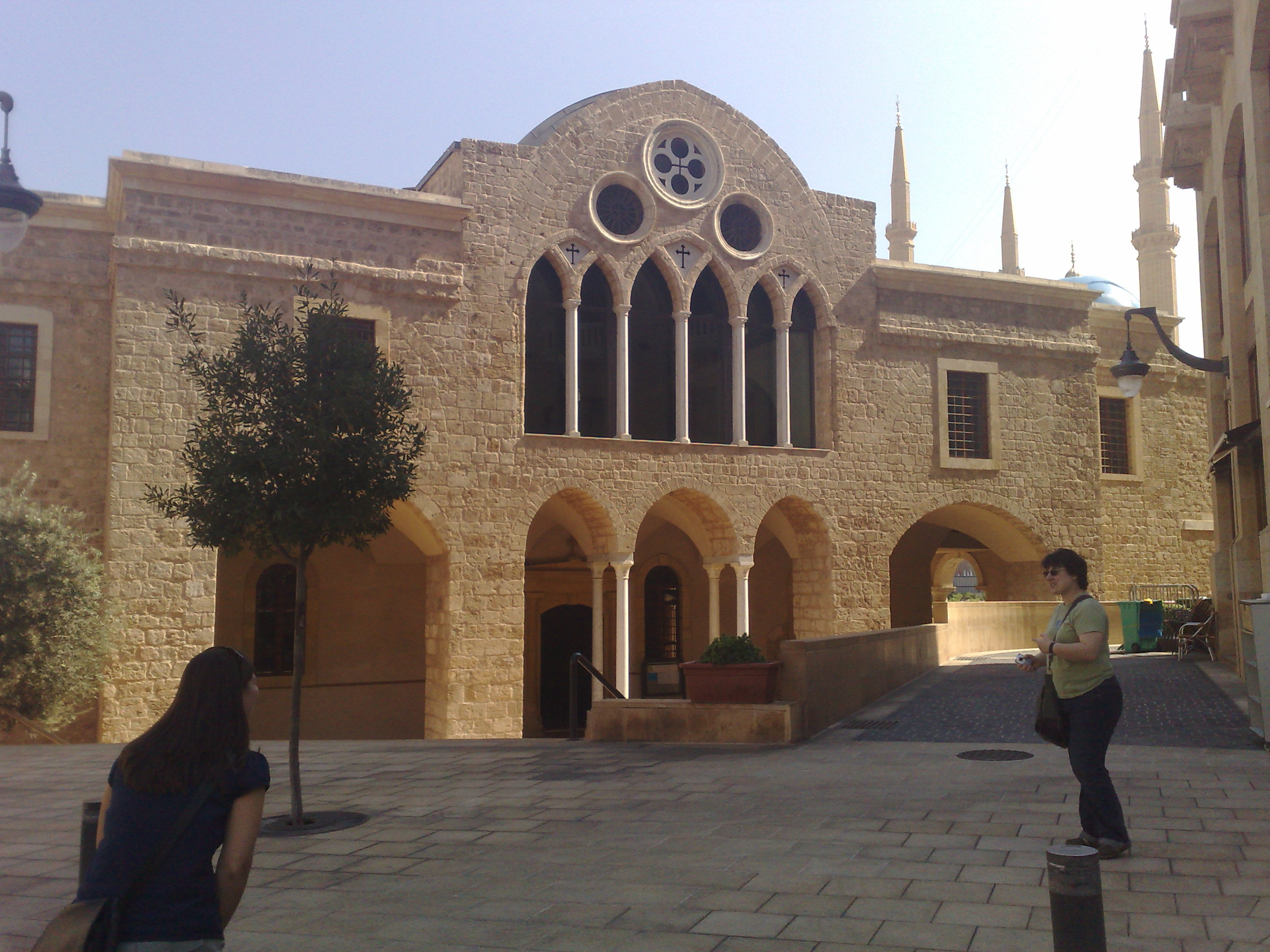 Beirut 017